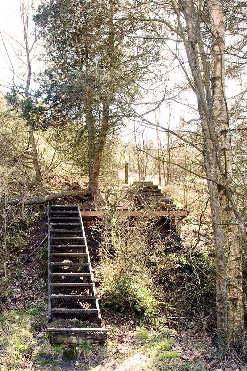 Åsted Ådal, natural resort in Vendsyssel, Denmark/ naturområde i Vendsyssel